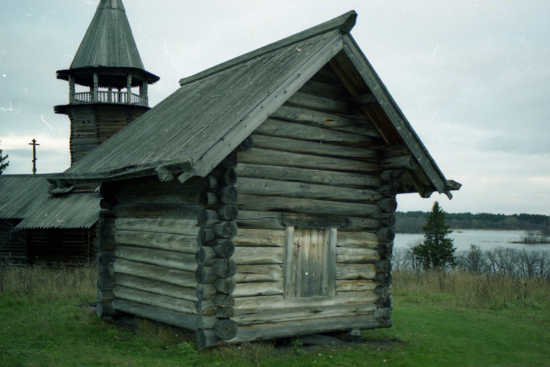 Амбар семеновой. музей-заповедник «кижи» (Республика Карелия, Медвежьегорск, остров кижи, перевезен из д. сорочья гора олонецкого р-на)